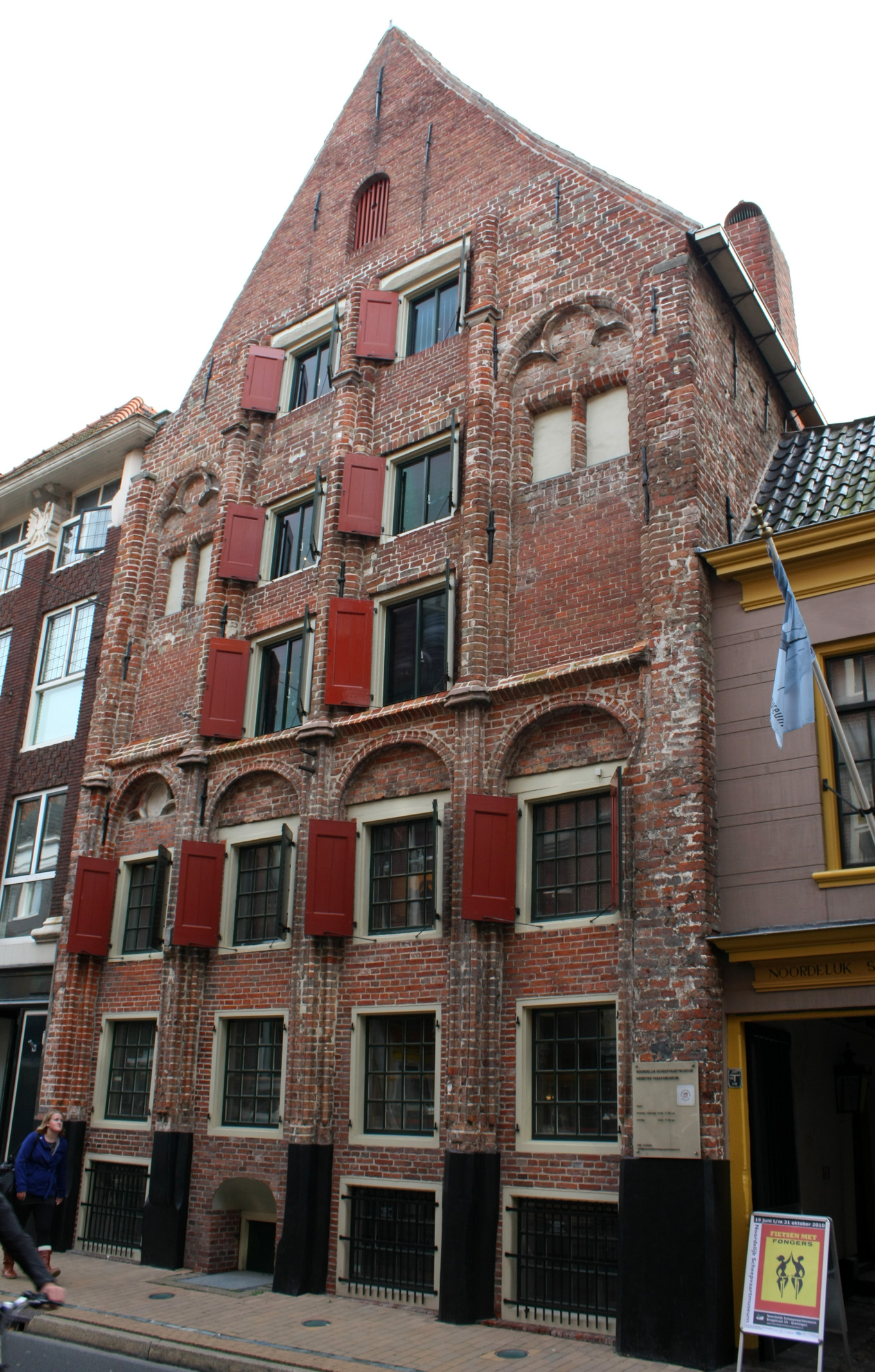 Brugstraat 24, Groningen